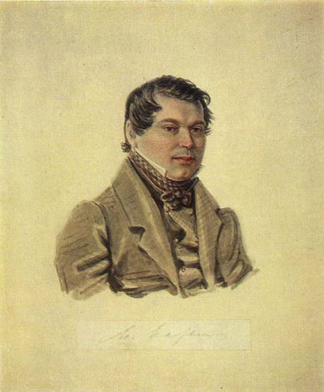 Нарышкин М.М.